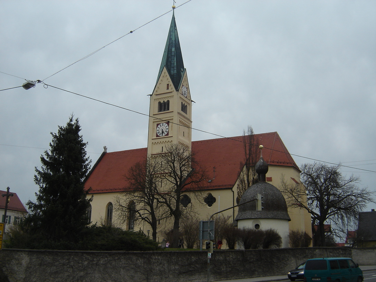 St. Felizitas Kirche in Bobingen